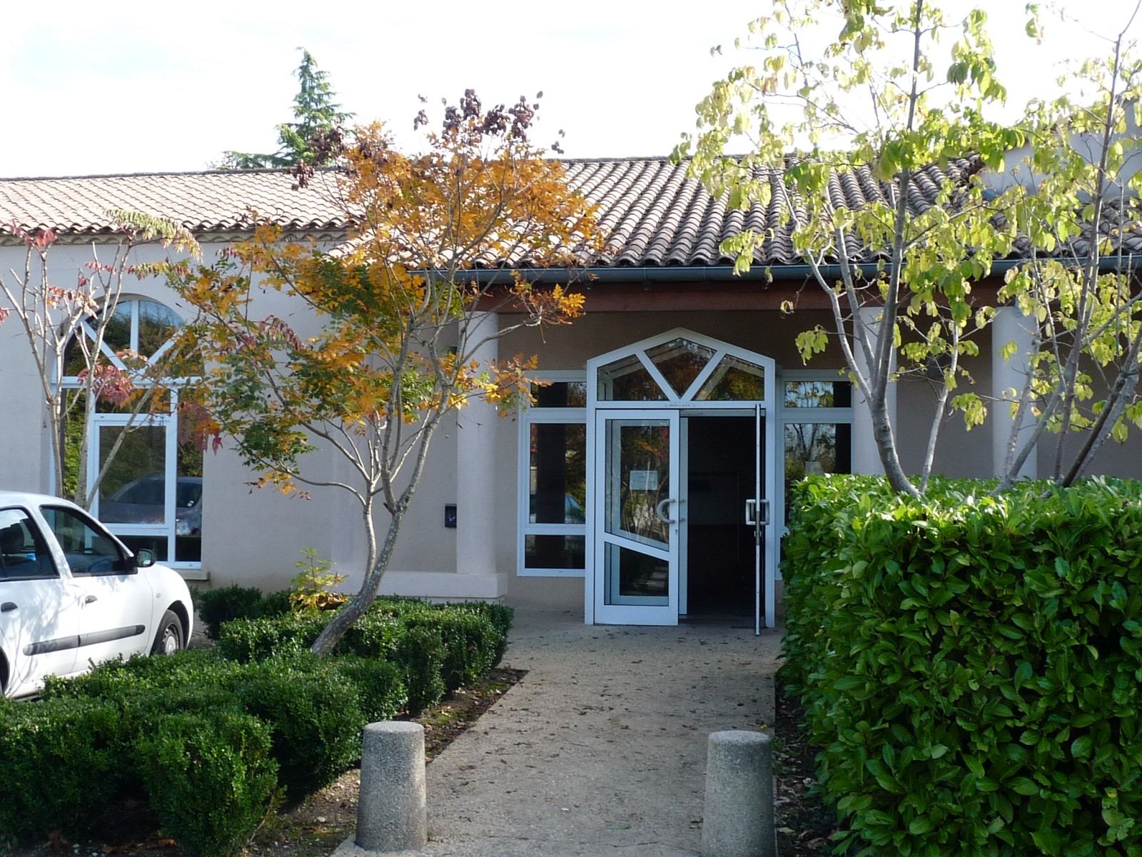 Salle des fêtes, Comps, Gironde, France